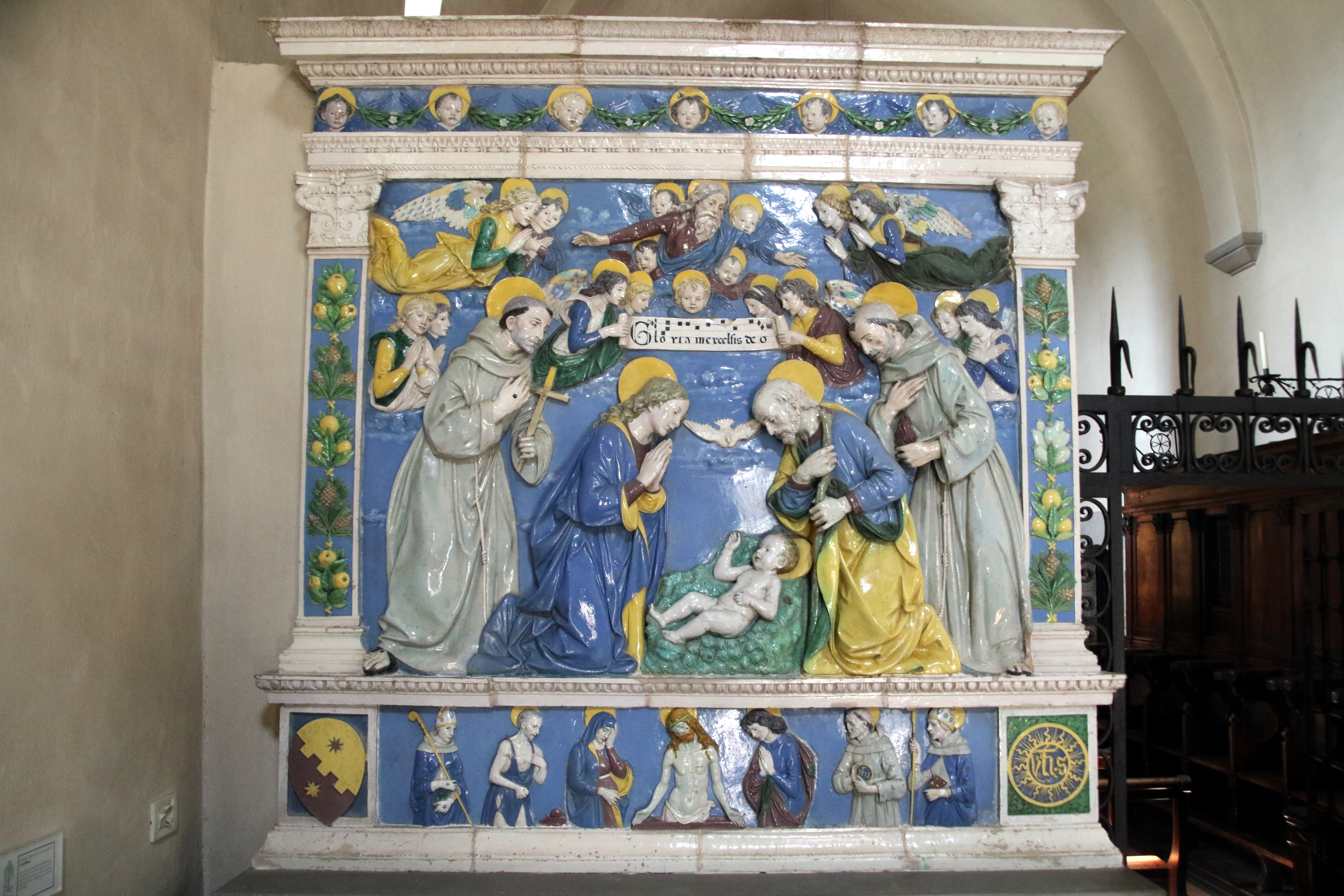 Andrea della Robbia e Luca della Robbia "il giovane", Natività, ante 1493, chiesa di Santa Maria degli Angeli (La Verna)